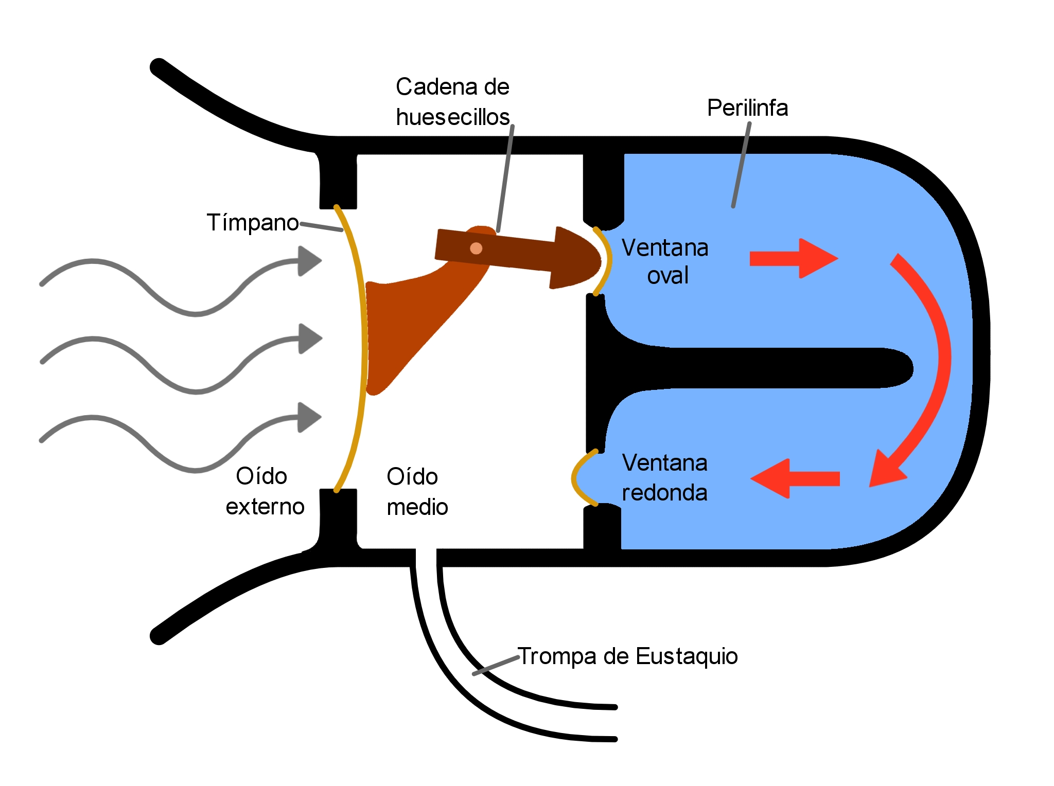 Esquema del oído en el que es visible la ventana redonda